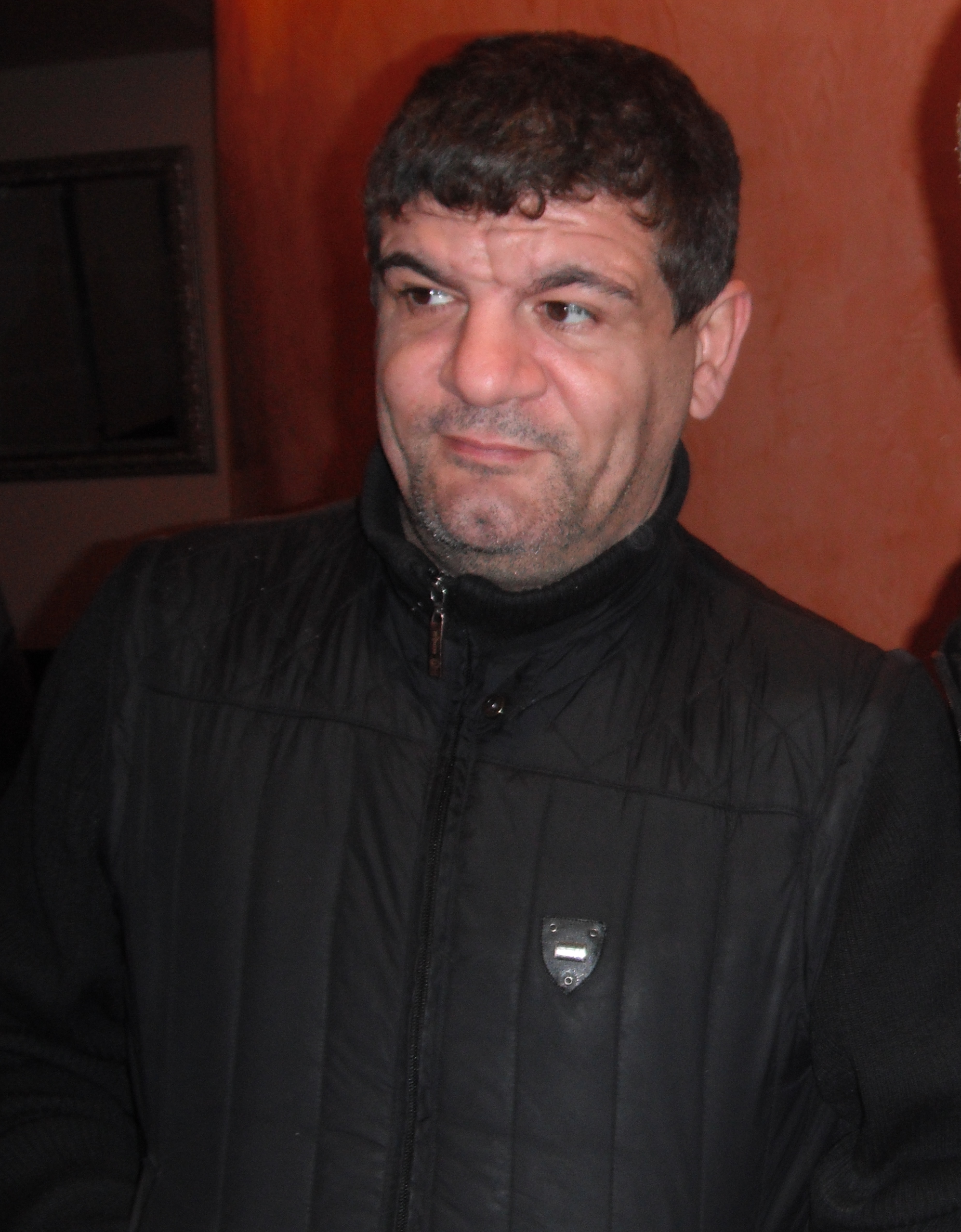 Alfredo Li Bassi attore nei casting che si sono tenuti a San Giovanni Rotondo, Italia.